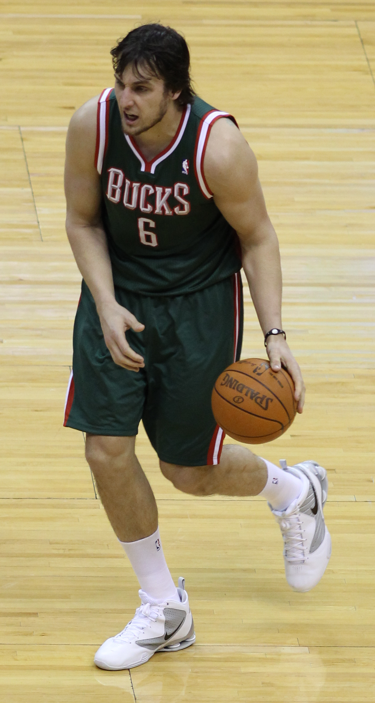 Wizards v/s Bucks 03/08/11